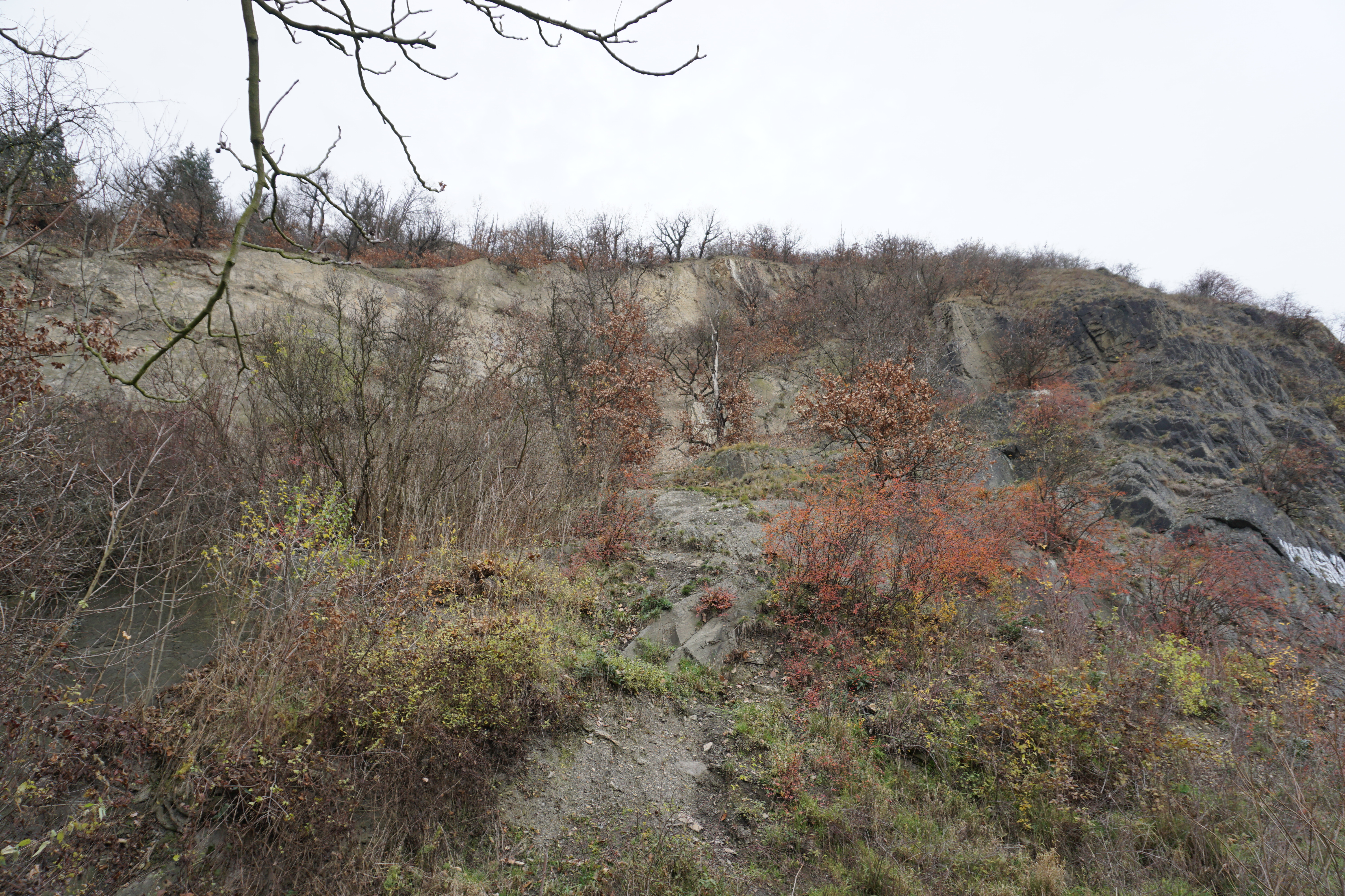 Výhled z Povltavské ulice